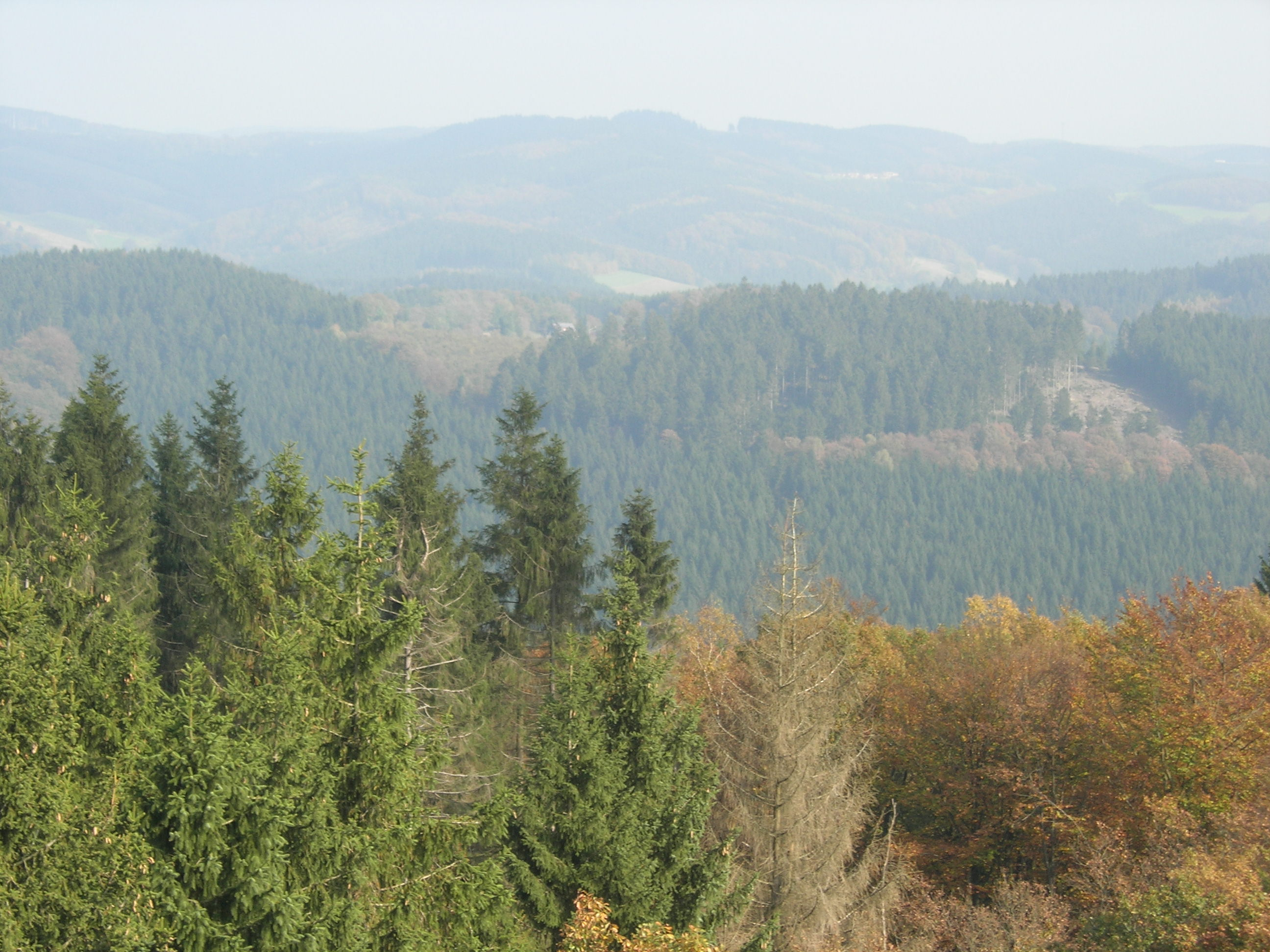 Blick auf die Homert